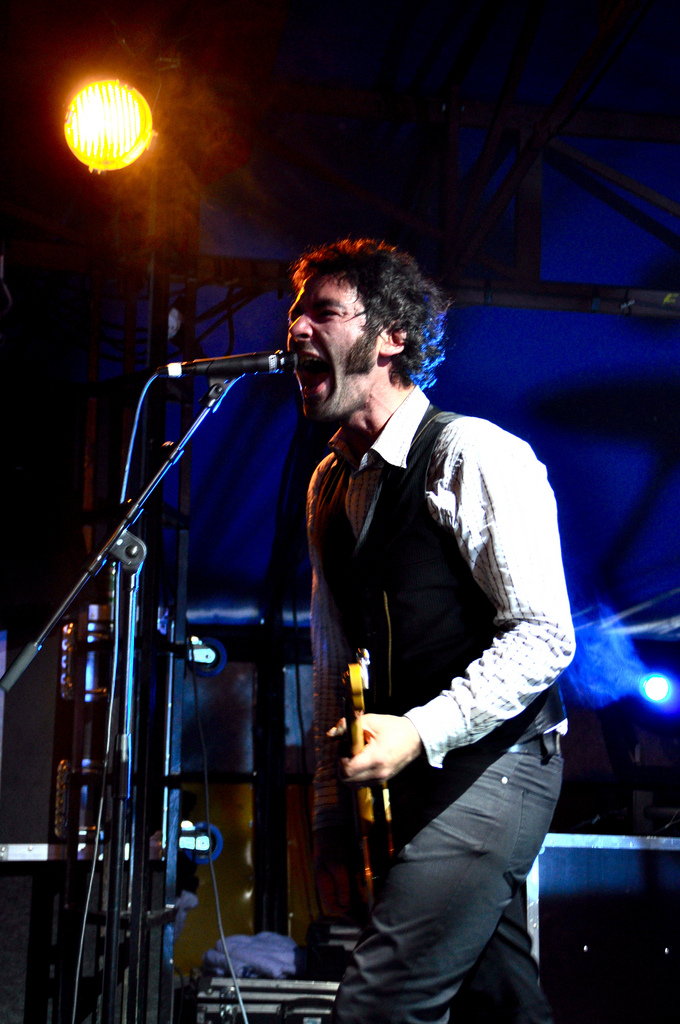 The Craftmen Club au Festival de Marne, Chapiteau de Choisy le Roy, 10 octobre 2009